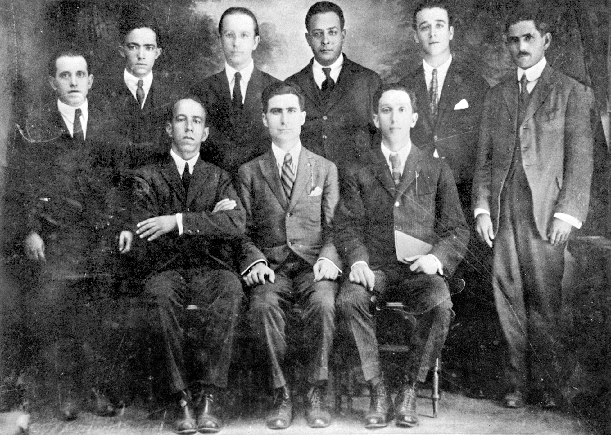 Fundadores do Partido Comunista Brasileiro (PCB), em março de 1922. De pé, da esquerda para a direita: Manuel Cendon, Joaquim Barbosa, Astrogildo Pereira, João da Costa Pimenta, Luís Peres e José Elias da Silva; sentados, da esquerda para a direita: Hermogênio Silva, Abílio de Nequete e Cristiano Cordeiro.